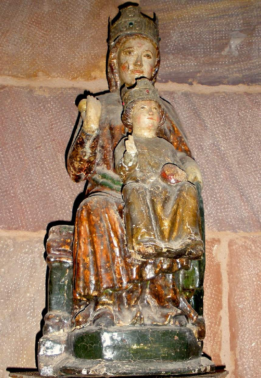 Monasterio de Santa María la Real, Mave (Palencia) . Talla mariana